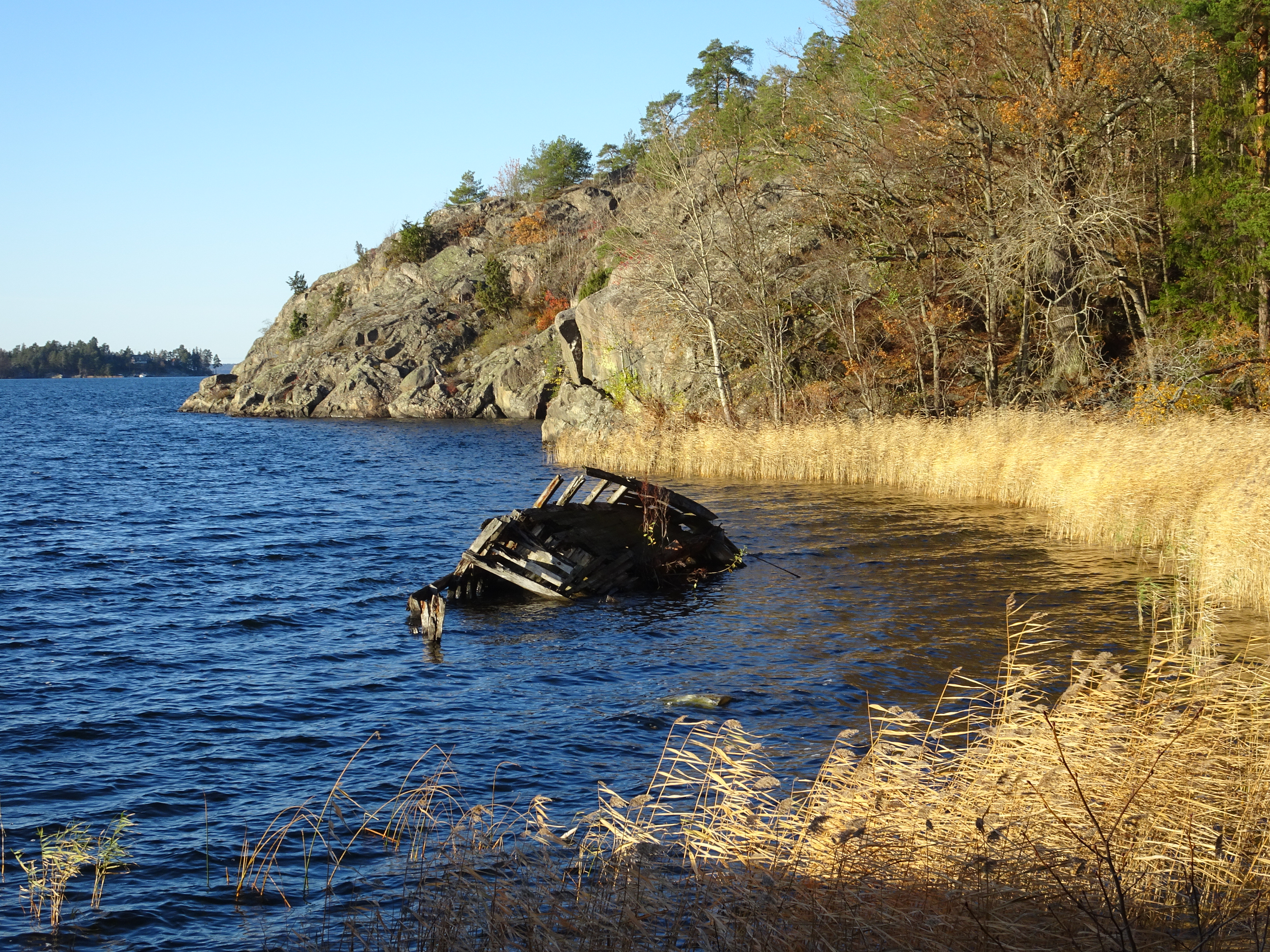 Gåsberget, södra sida.